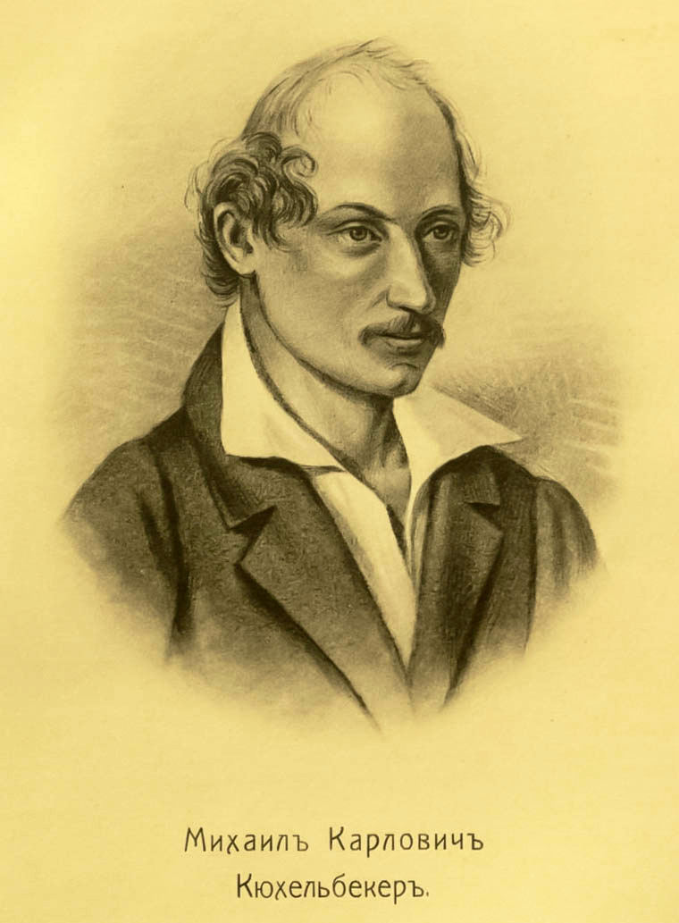 Головачев, П. М. Декабристы : 86 портретов, вид Петровского завода и 2 бытовых рисунка того времени. - М., [1906]